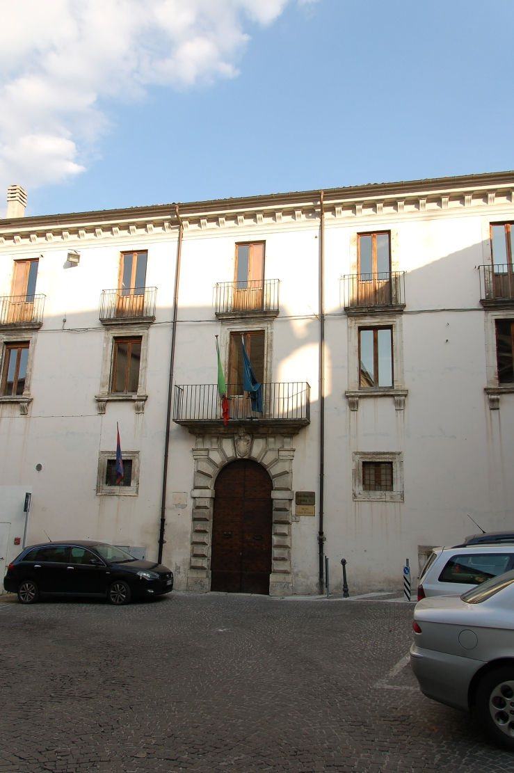 Sulmona 2011